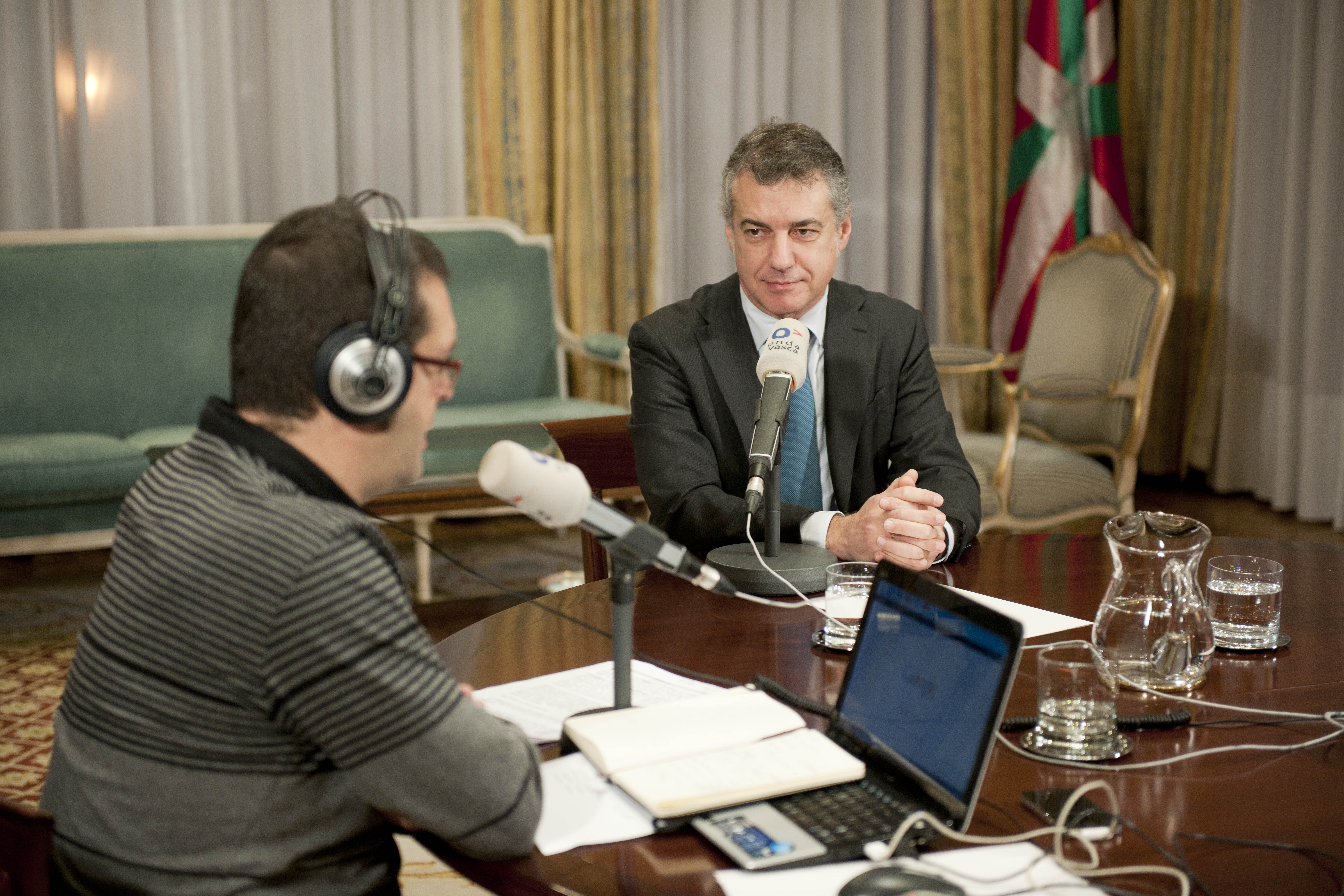 Xabier Lapitz entrevista a Iñigo Urkullu en el programa Euskadi Hoy de Onda Vasca. La entrevista tuvo lugar en el palacio de Ajuria Enea